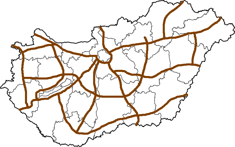 Az 1974-es autópályatervezet